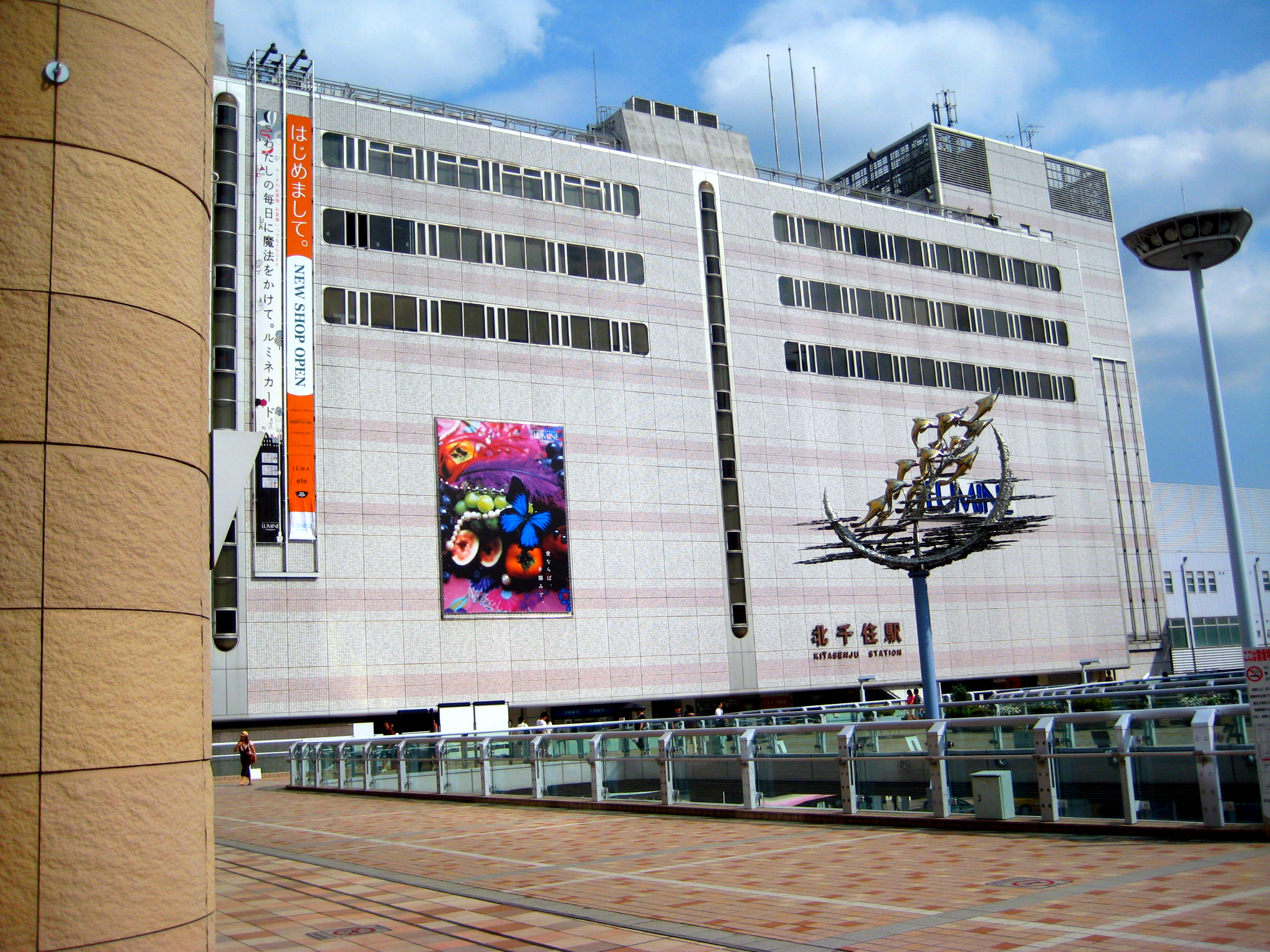 北千住駅、西口。投稿者自身によって撮影されました。